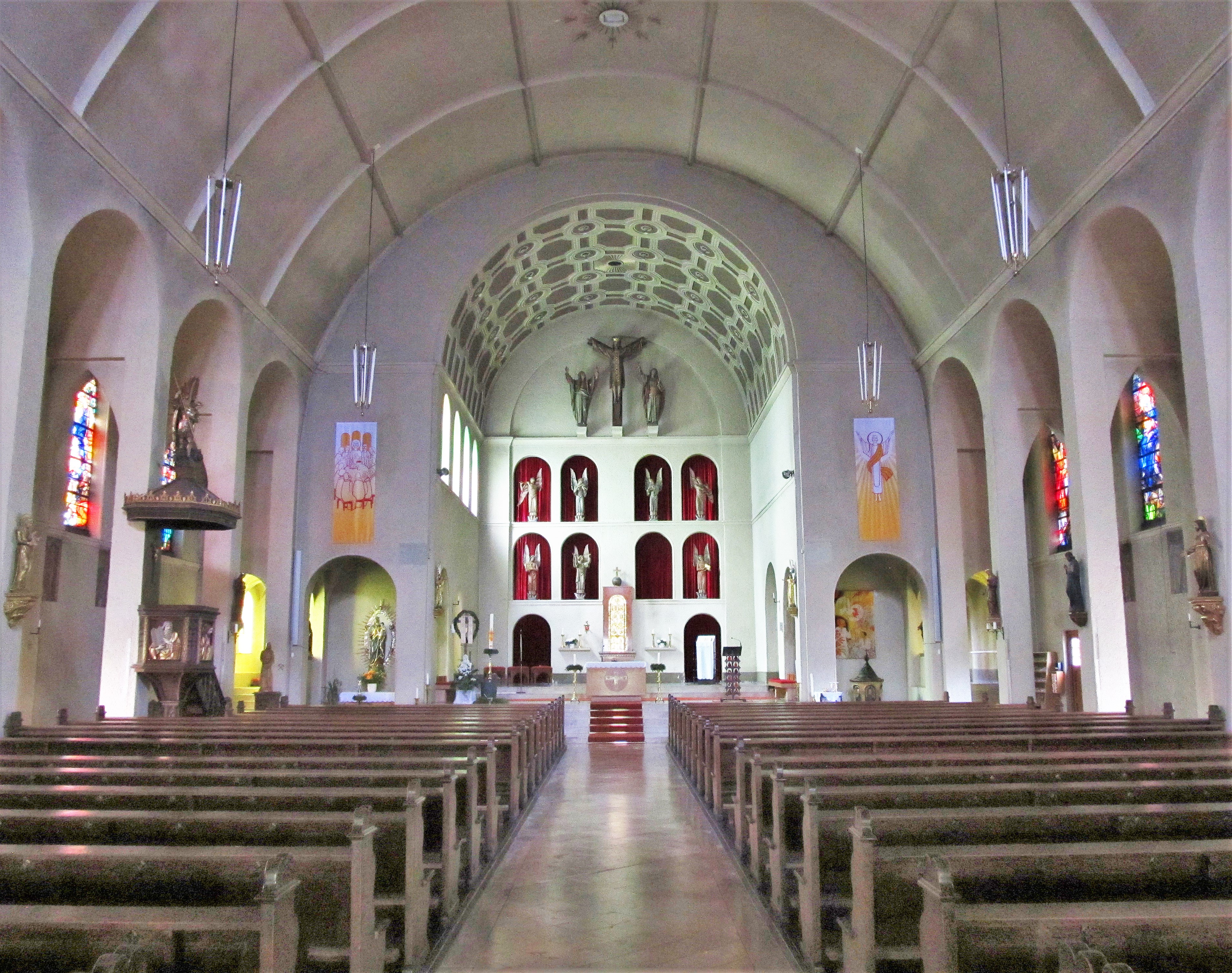 Blick ins Innere der katholischen Pfarrkirche St. Marien bzw. Sieben Schmerzen Mariä in Friedrichsthal (Saar), Regionalverband Saarbrücken, Saarland